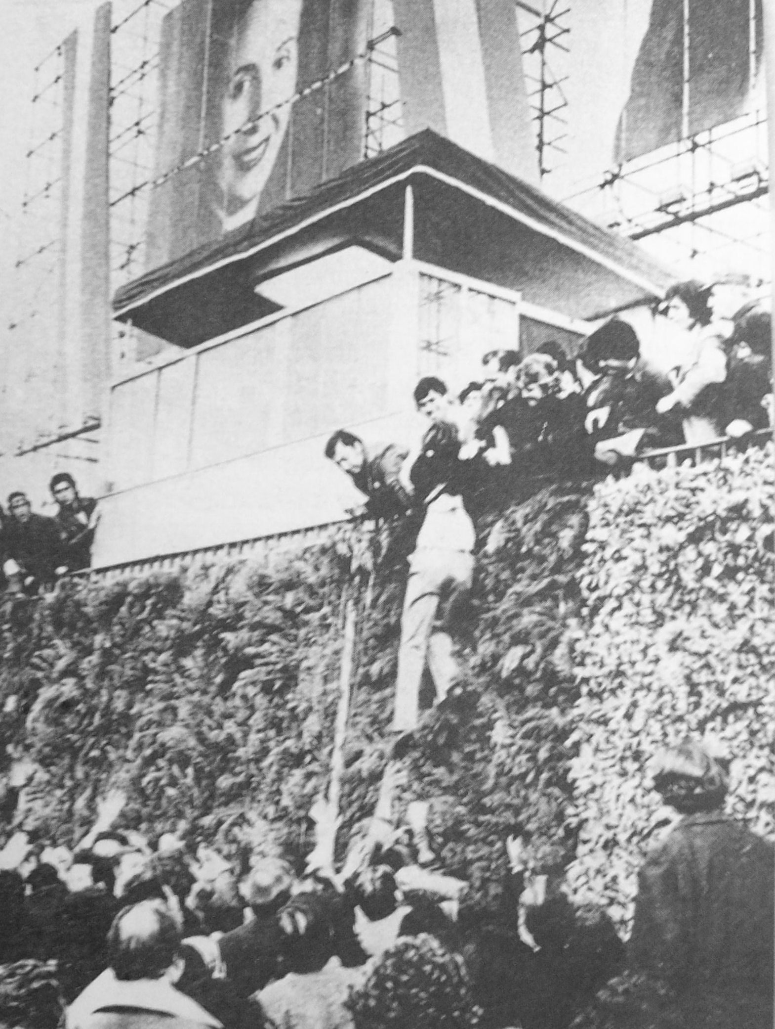 Foto de Juan José Rincón, secretario de Prensa de la Juventud Peronista de la República Argentina (JPRA) de Avellaneda, sufriendo un intento de linchamiento desde el palco donde tendría que haber hablado Perón, en su vuelta a la Argentina, durante un hecho violento conocido como La Masacre de Ezeiza. Fuente: Zicolillo, Jorge (2013), La era de los culatas. La derecha peronista y el patoterismo sindical. Buenos Aires : Vergara, pp. 144-146. ISBN 978-950-15-2579-3